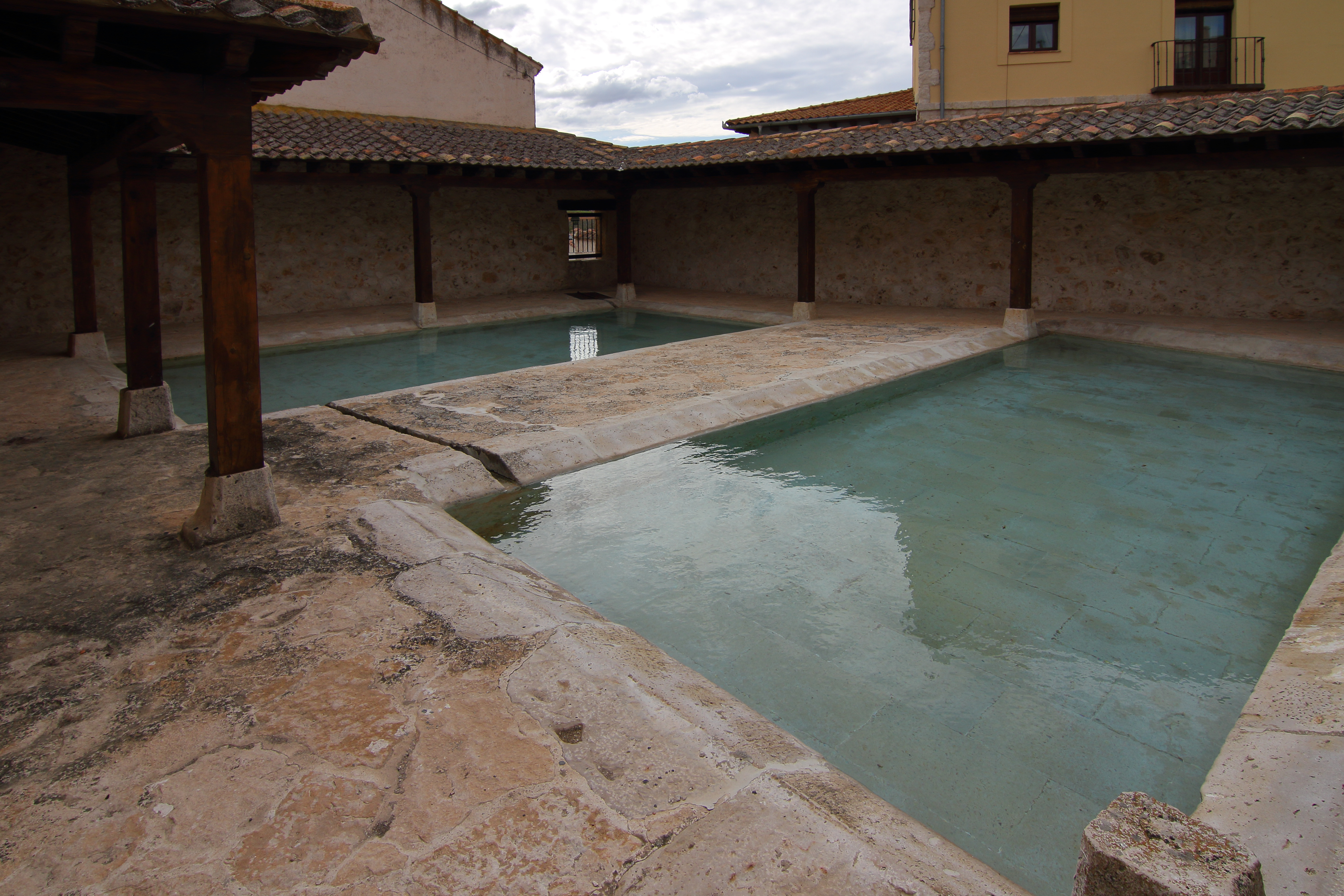 Fuentelcésped, lavadero, 01